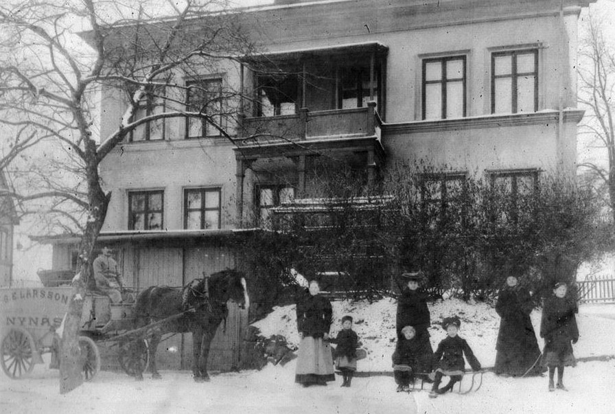 Larssons Limpbageri Nynäs, Gröndal